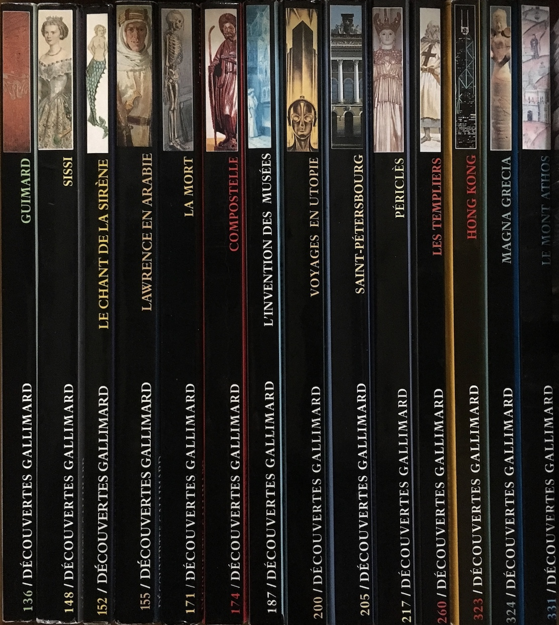 Les dos des livres de la collection « Découvertes Gallimard ». Liste des livres (de gauche à droite) : Guimard : L’Art nouveau (nº 136) par Philippe Thiébaut ; Sissi : L’impératrice anarchiste (nº 148) par Catherine Clément ; Le chant de la sirène (nº 152) par Vic de Donder ; Lawrence en Arabie (nº 155) par Henry Laurens ; L’heure du grand passage : Chronique de la mort (nº 171) par Michel Vovelle ; Compostelle : Le grand chemin (nº 174) par Xavier Barral i Altet ; L’invention des musées (nº 187) par Roland Schaer ; Voyages en Utopie (nº 200) par Georges Jean ; La magie blanche de Saint-Pétersbourg (nº 205) par Dominique Fernandez ; Périclès : L’apogée d’Athènes (nº 217) par Pierre Brulé ; Les Templiers : Chevaliers du Christ (nº 260) par Régine Pernoud ; Hong Kong : Rendez-vous chinois (nº 323) par Denis Hiault ; Magna Grecia : Les colonies grecques dans l’Italie antique (nº 324) par Pier Giovanni Guzzo ; Le Mont Athos : Merveille du christianisme byzantin (nº 331) par André Paléologue.